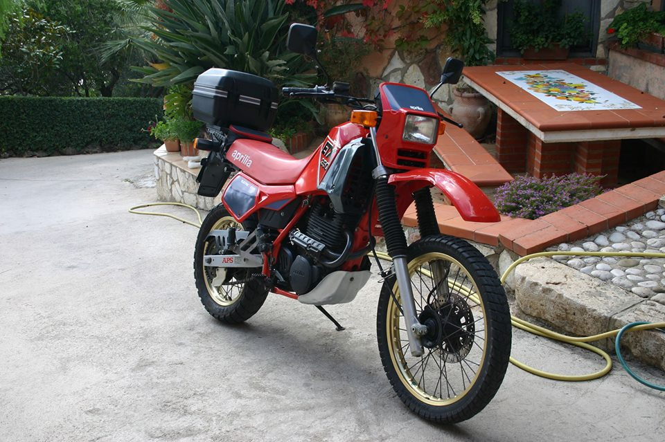 ETX 350